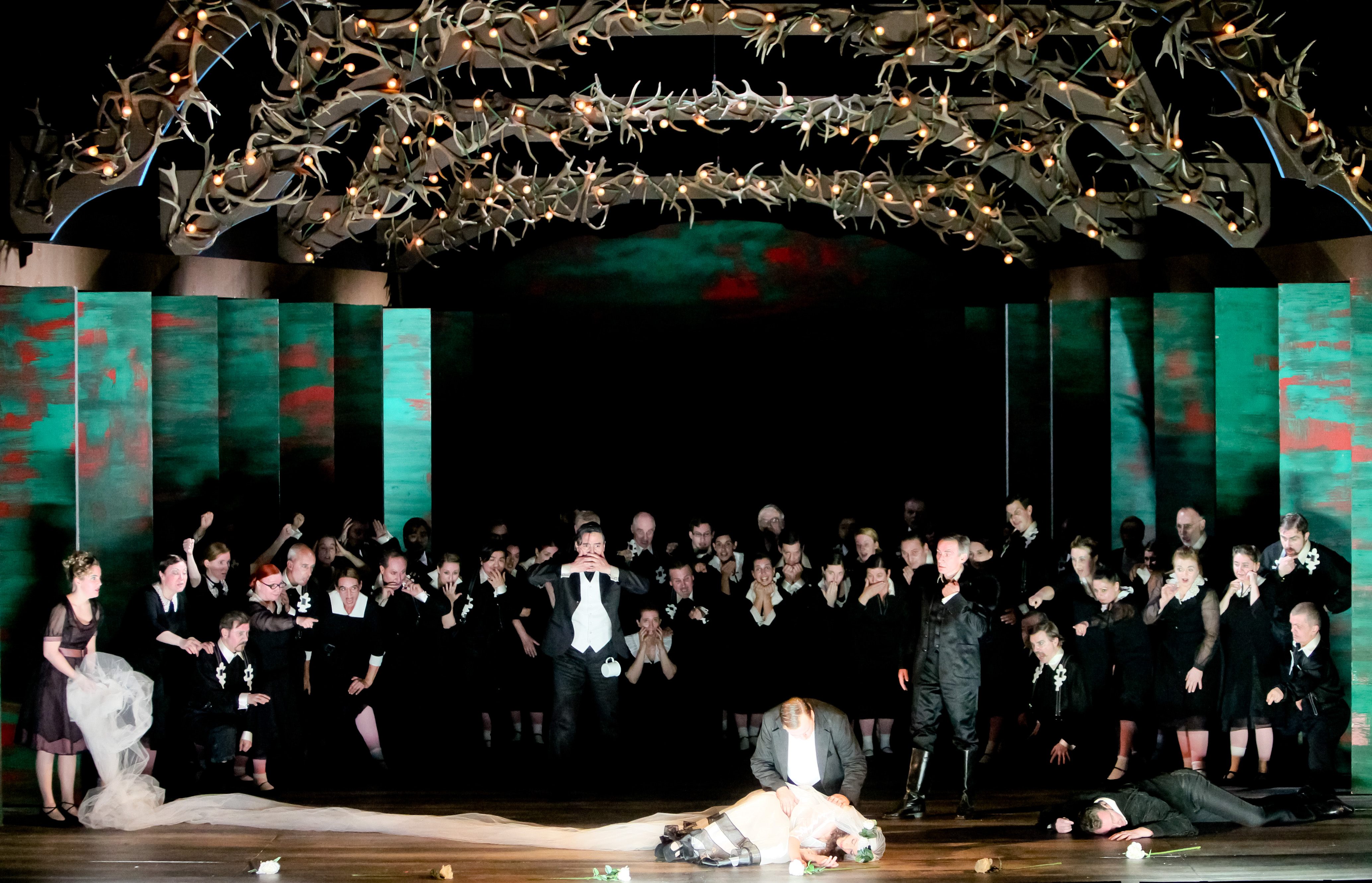 Der Freischütz, Regie: Aniara Amos für Theater Magdeburg